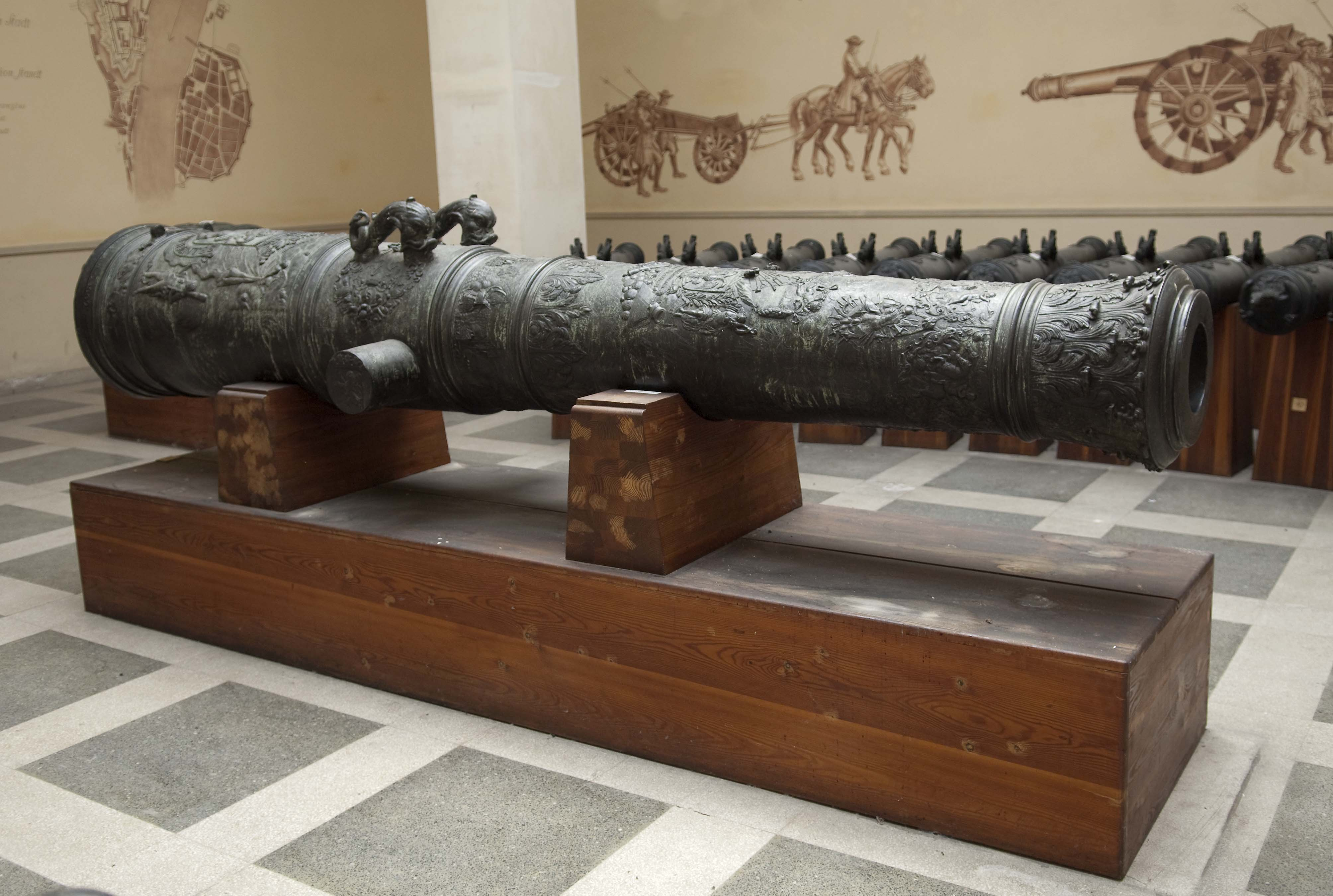 Österreichische Kartaune, gegossen 1669 in Lübeck von Albert Benningk, in der Artilleriehalle des Heeresgeschichtlichen Museums in Wien.